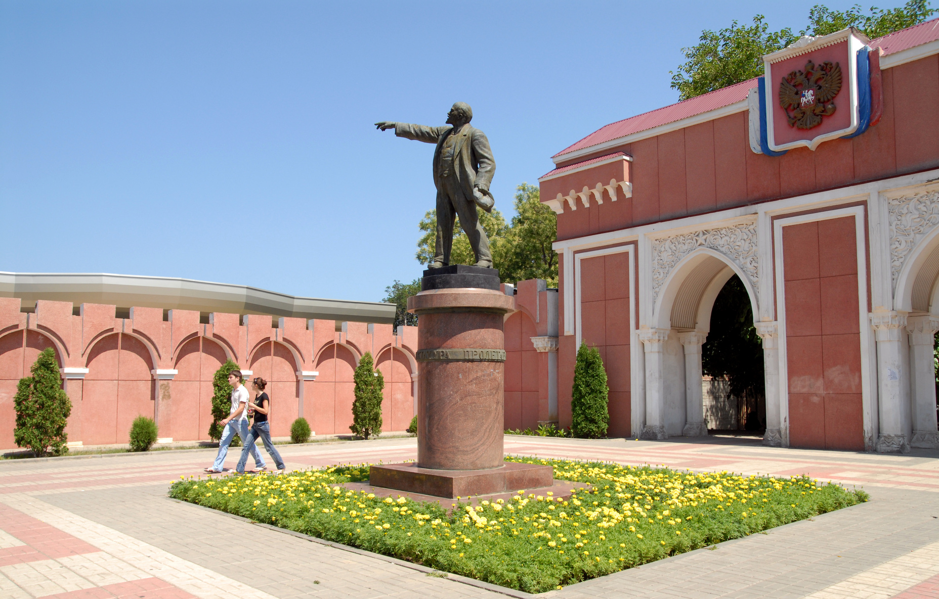 Махачкала